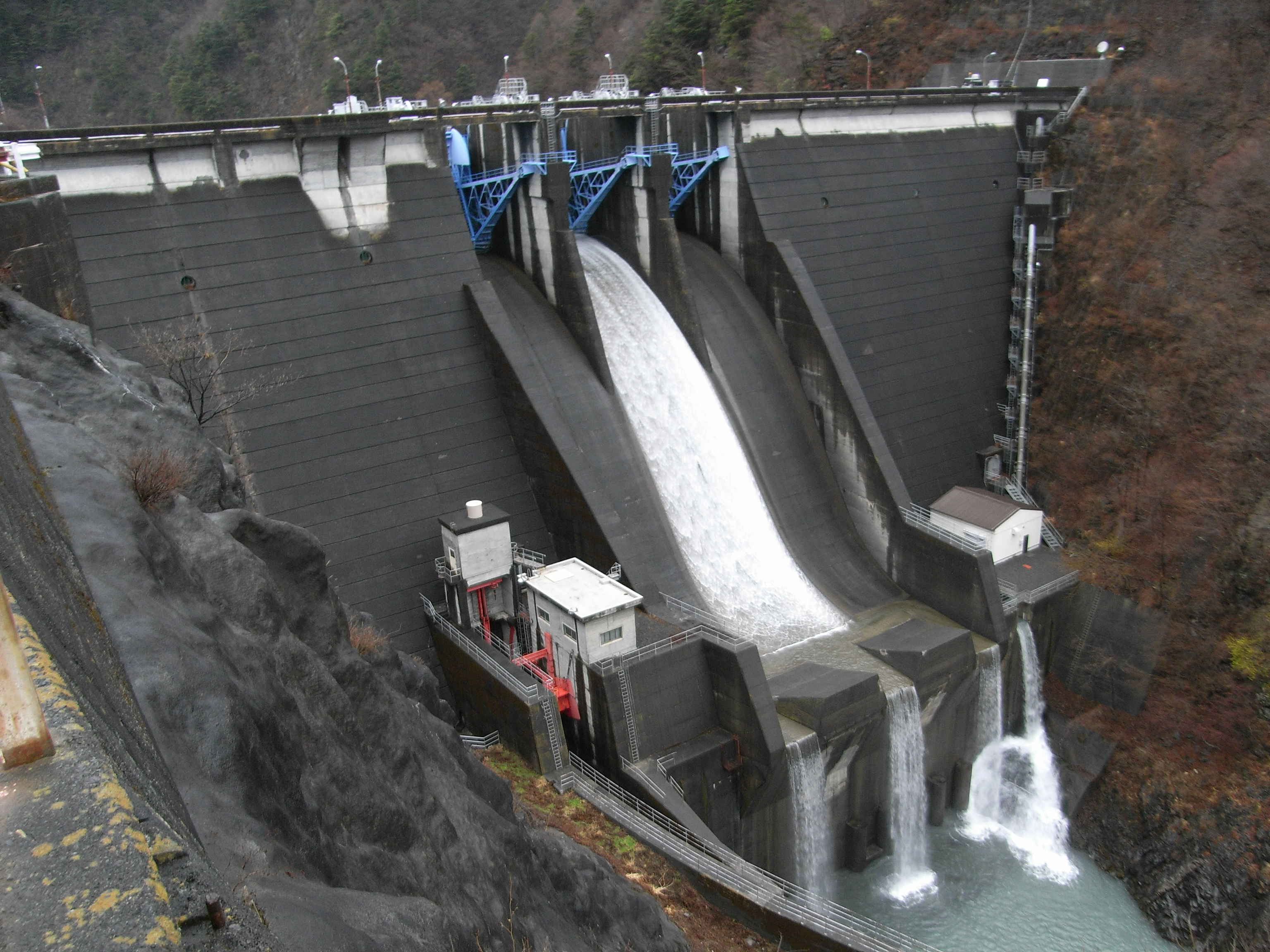 Dam